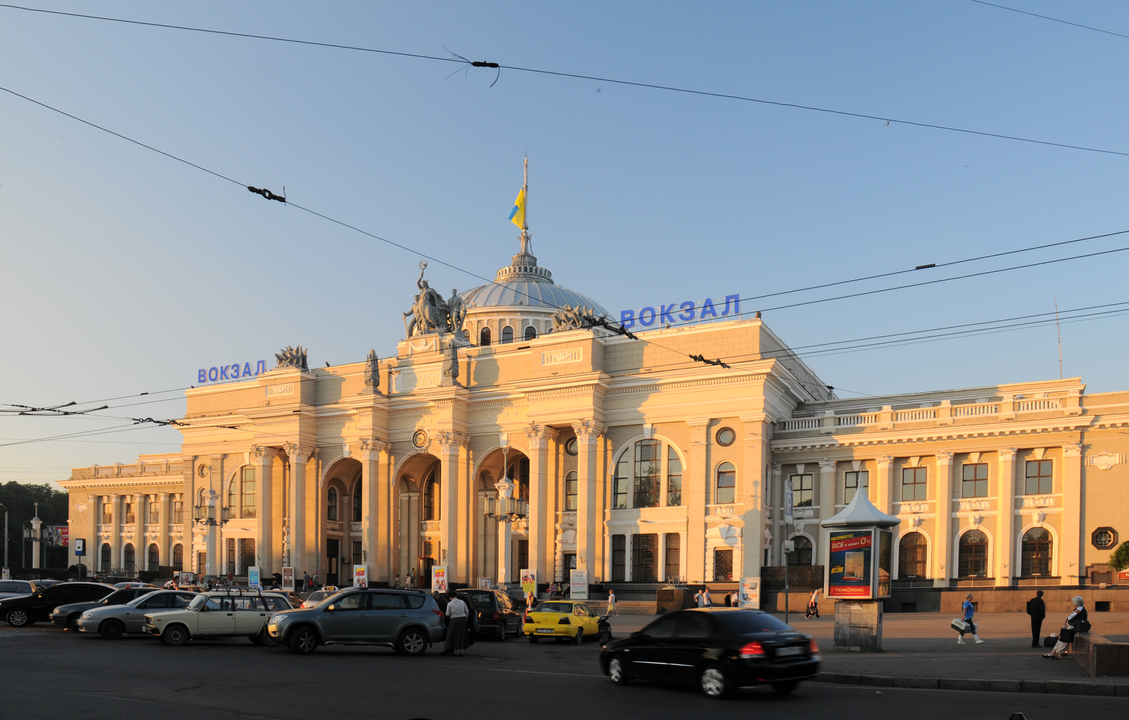 Одеса, залізничний вокзал